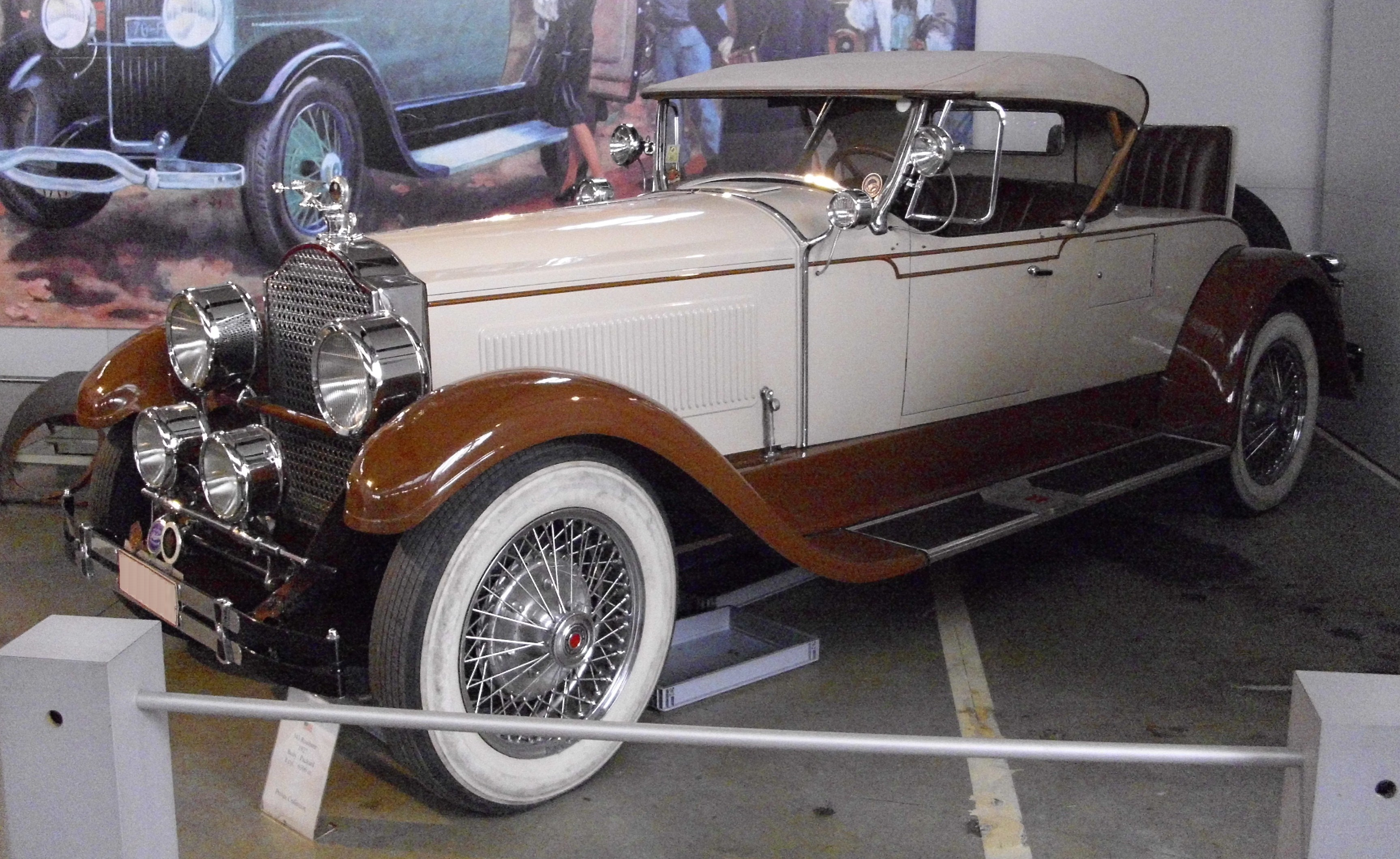 Packard 343 oder Six 426 oder Six 433 1927